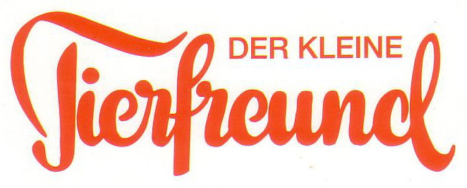 Logo Der Kleine Tierfreund vom Frühstyxradio, dem ursprünglichen Logo der seit 1949 erscheinenden Zeitschrift Der kleine Tierfreund (heute Tierfreund) nachempfunden